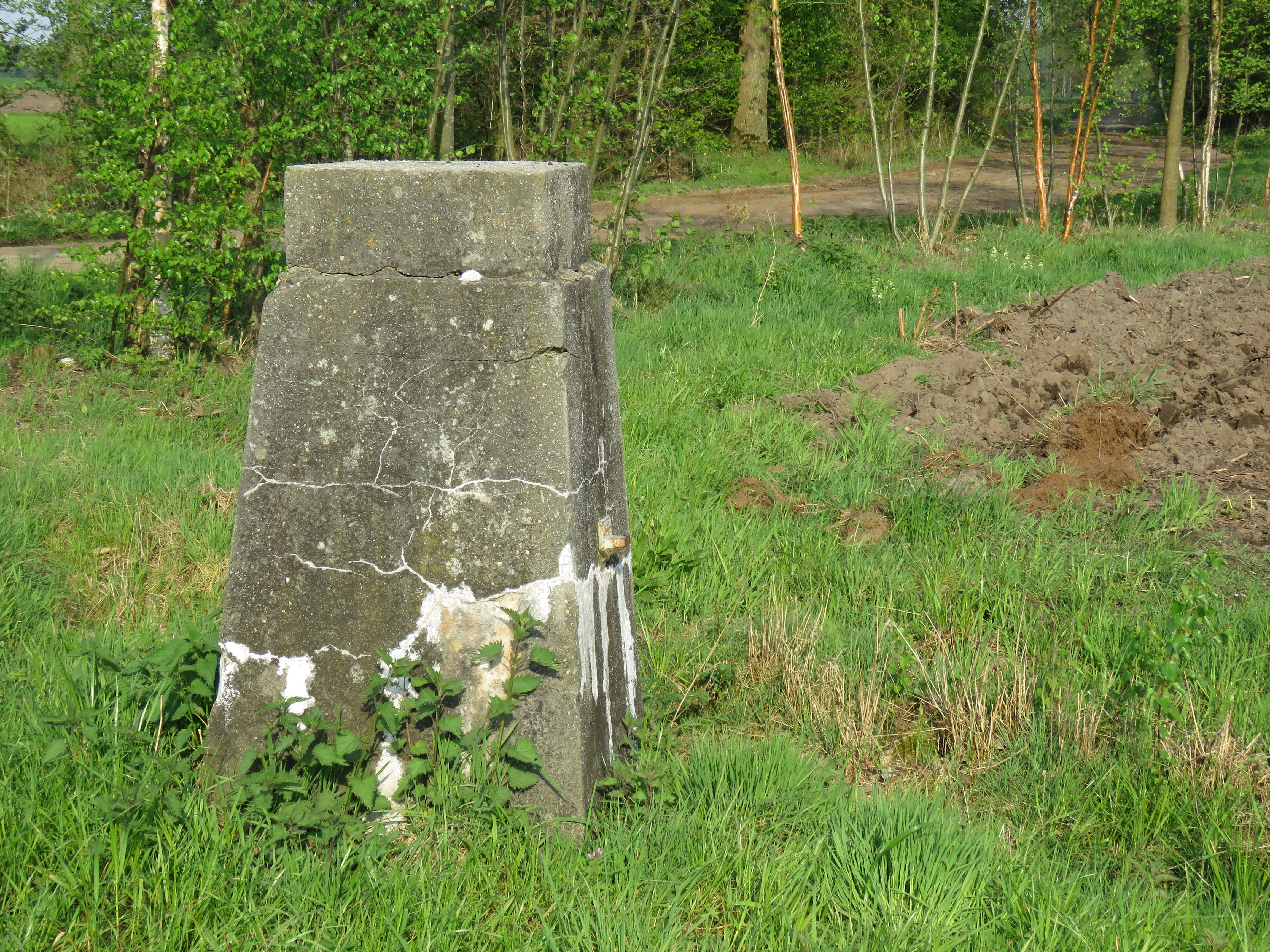 Westelijke eindpaal van de Geodetisch Basis van de Kempen in Geel uit 1939